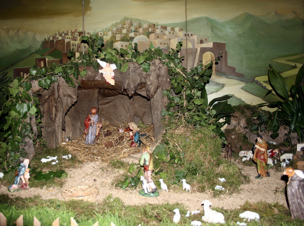 Jaslice u franjevačkoj crkvi Sv. Ivana Kapistrana u Iloku